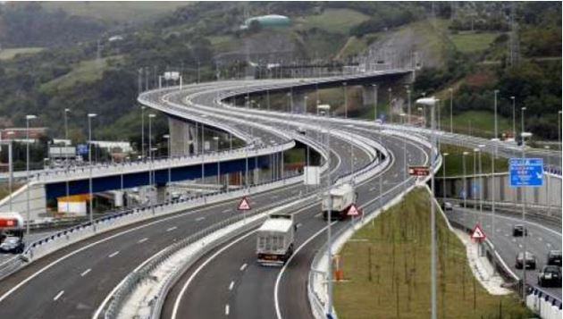 Vista del viaducto ya ejecutado y en funcionamiento